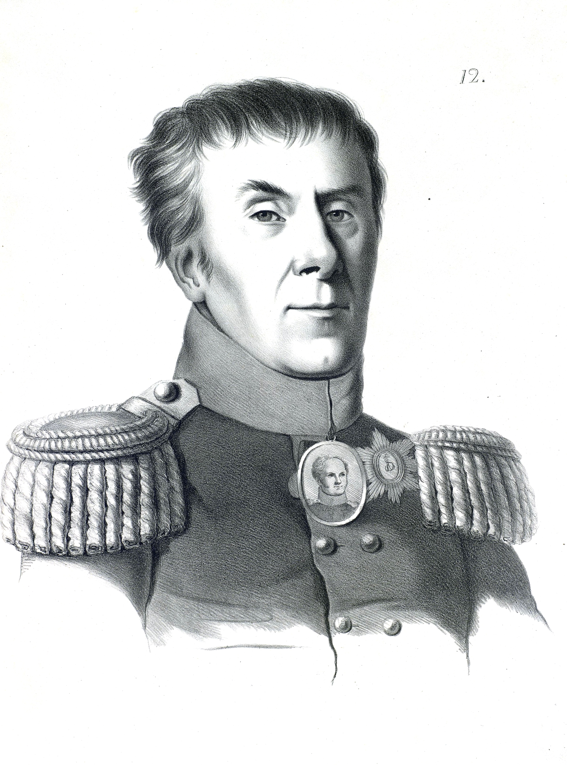 Аракчеев, Алексей Андреевич